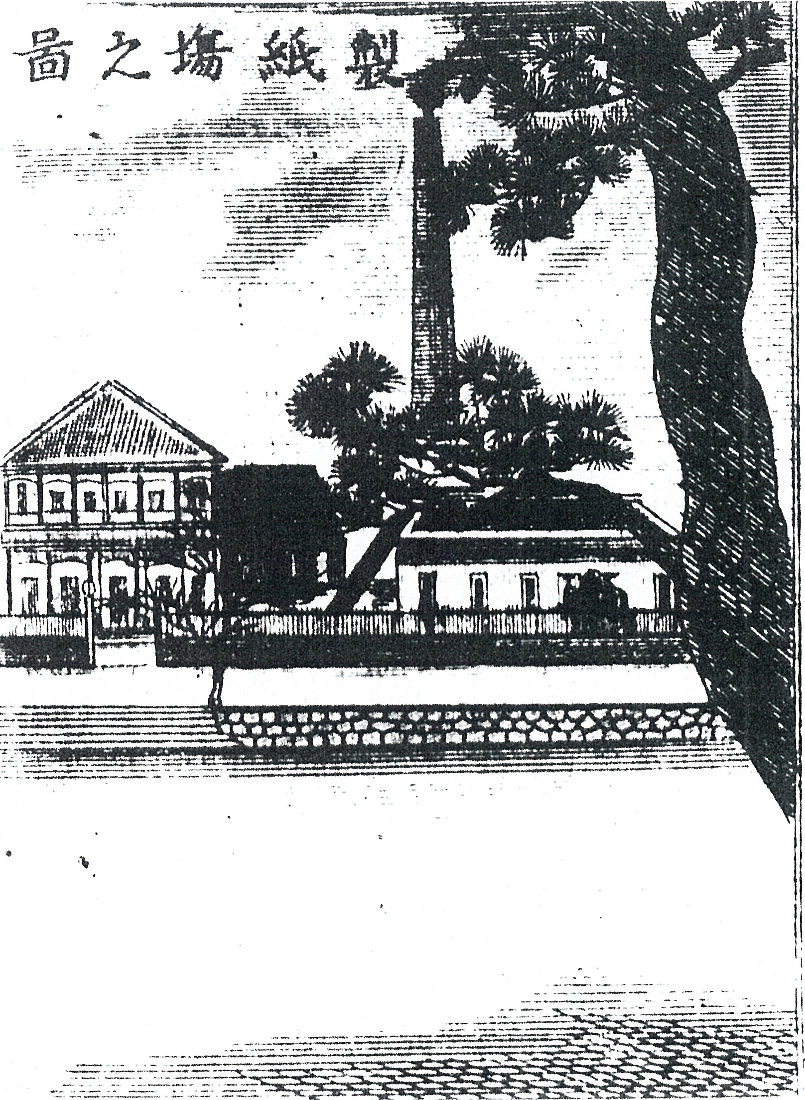 中之島製紙(1882)